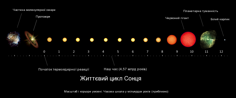 Еволюція Сонця. На основі роботи Айсика Бендера Solar-evolution.png